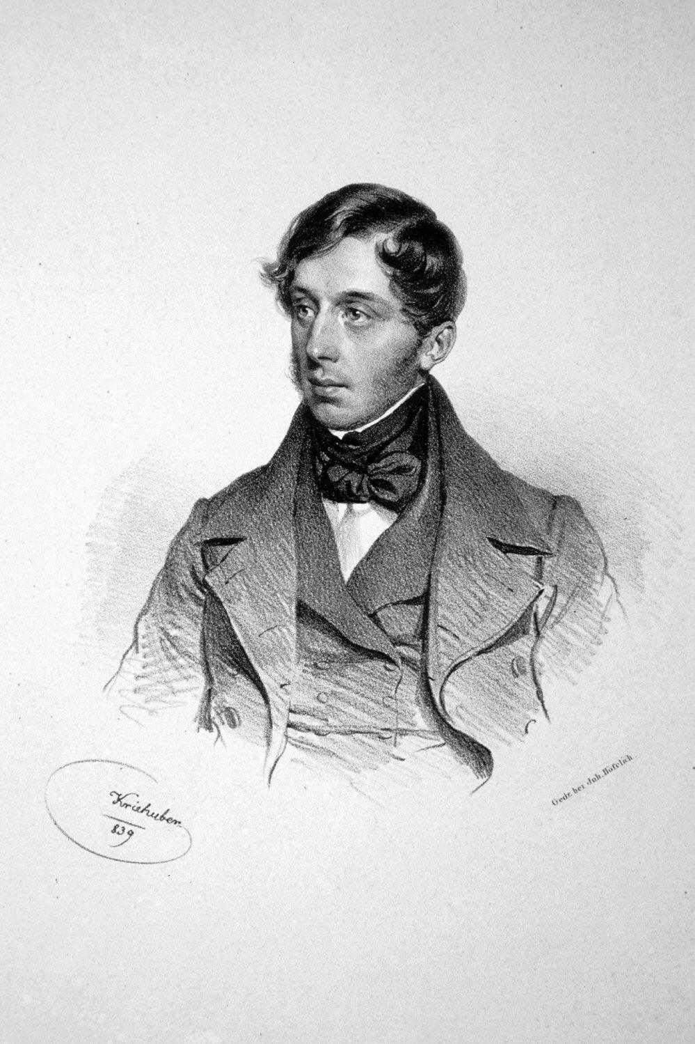 Zdzislaw Zamoyski Graf (1810-1855) Großgrundbesitzer in Galizien, Politiker. Lithographie von Josef Kriehuber, 1839